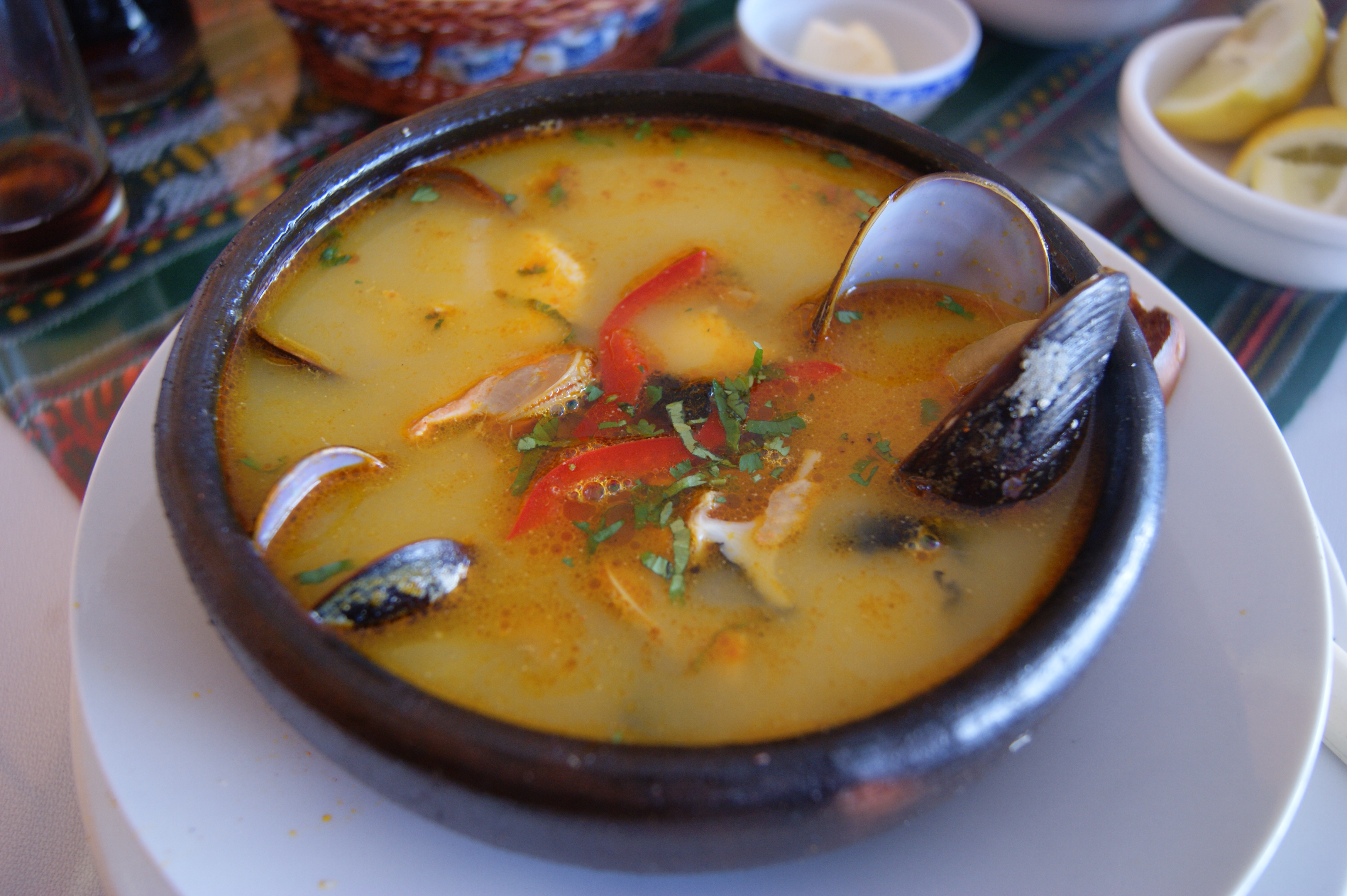 Jaiva de mariscos. Restaurant "El rey del marisco". Arica, Chile.